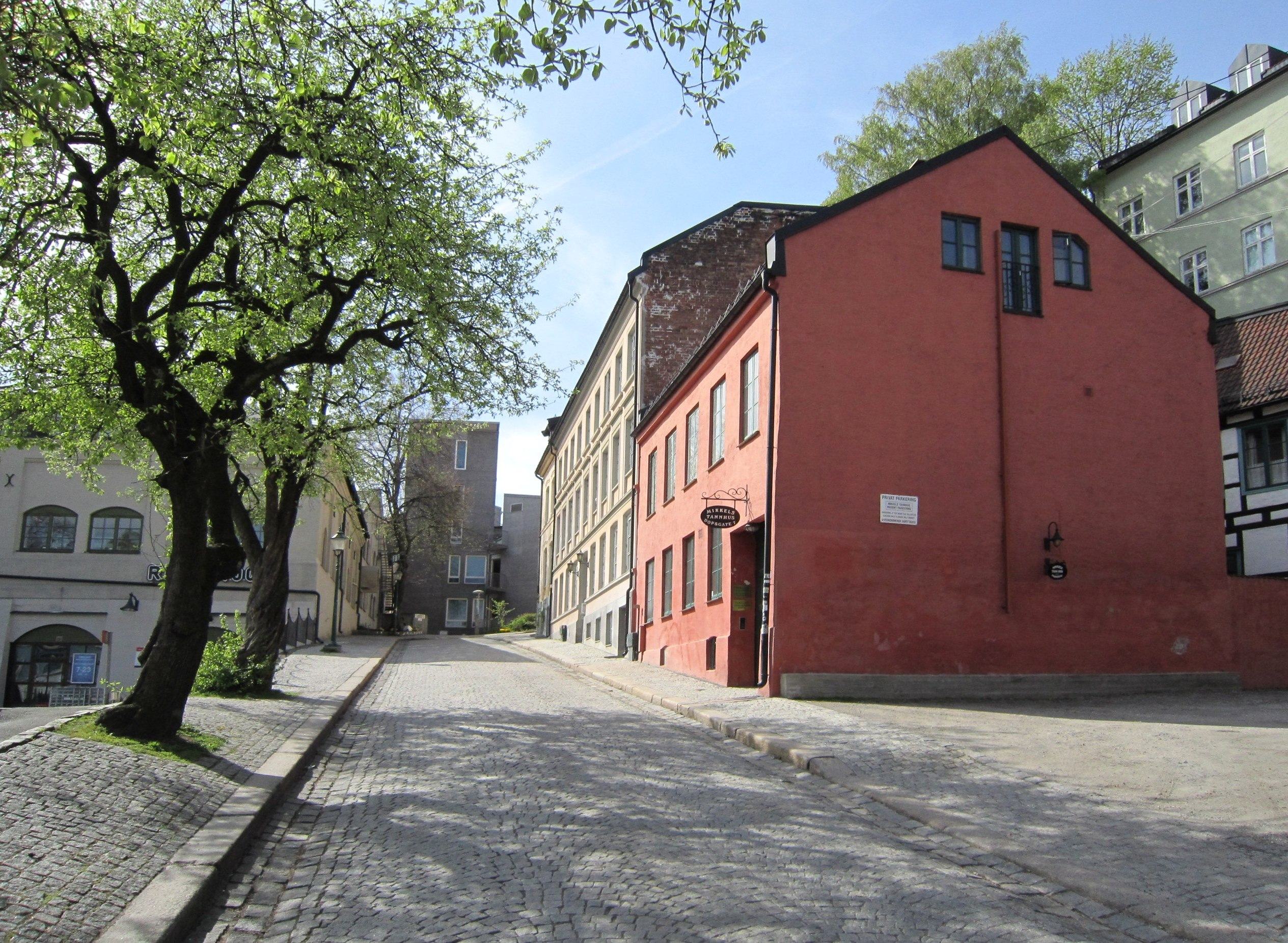 Dops gate i Oslo